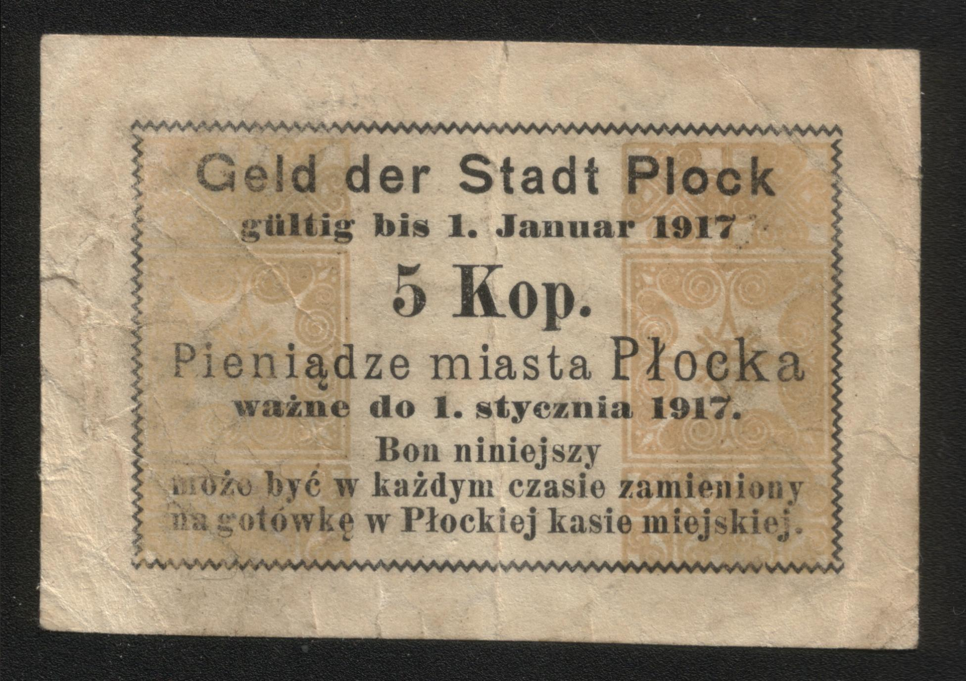 Notgeldschein der Stadt Plock über 5 Kopeken, gültig bis 1.Januar 1917